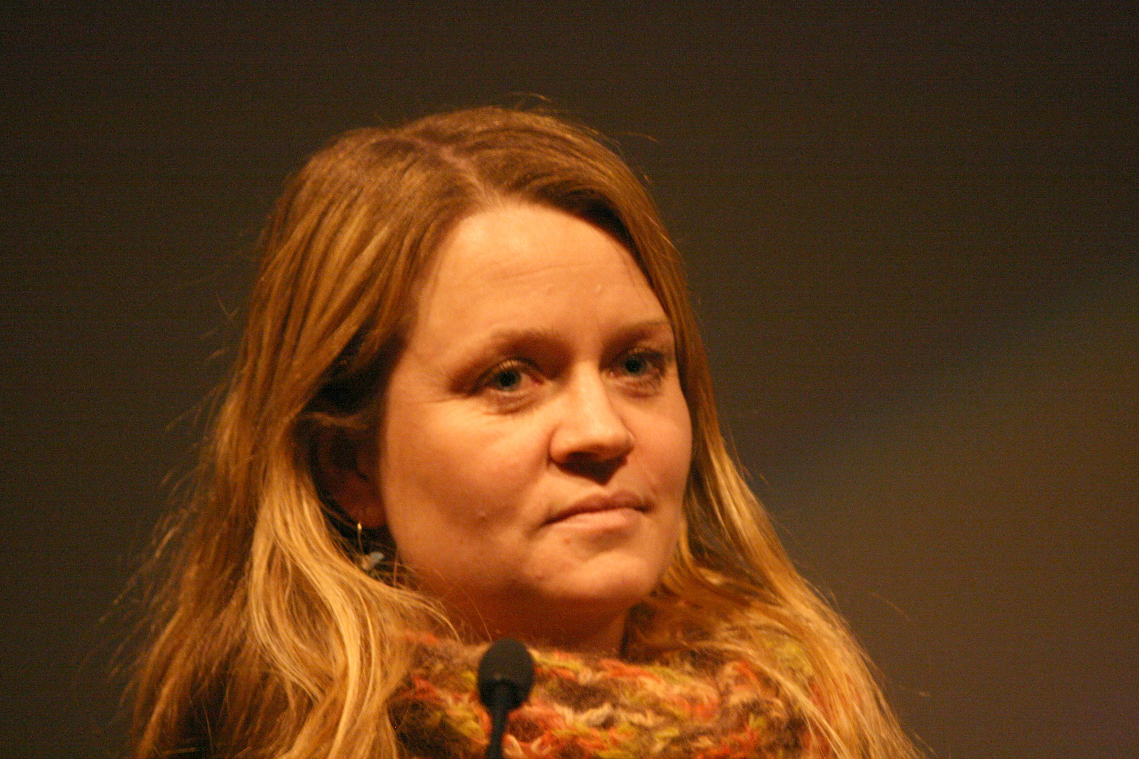 Marte Thorsby (direktør i IFPI Norge) under paneldebatten i forbindelse med førpremieren på filmen Urospredere.